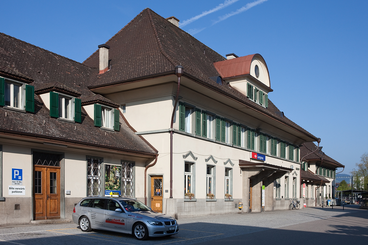 Bahnhof der BLS in Langnau im Emmental